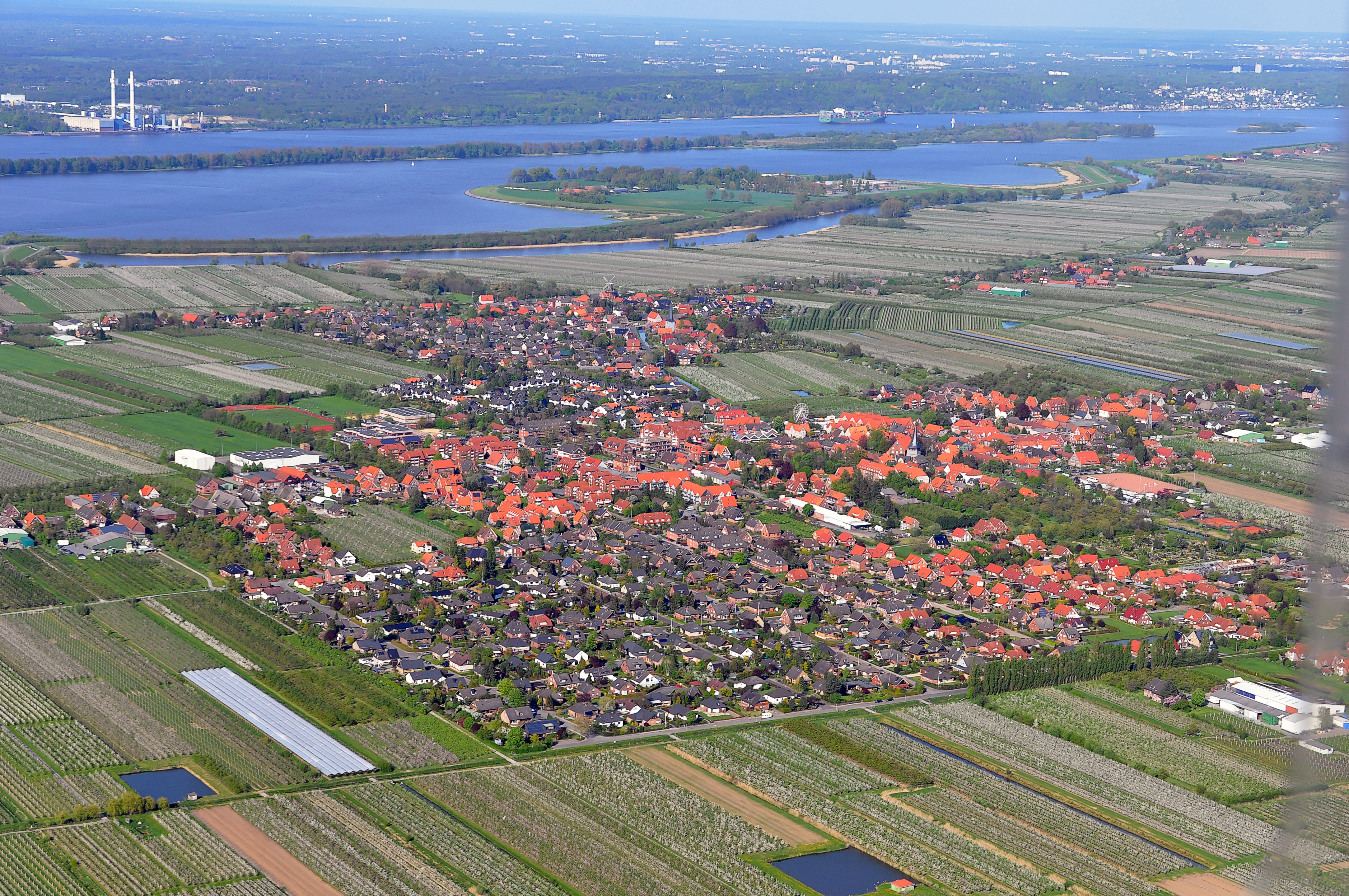 Luftbilder von der Nordseeküste 2012-05